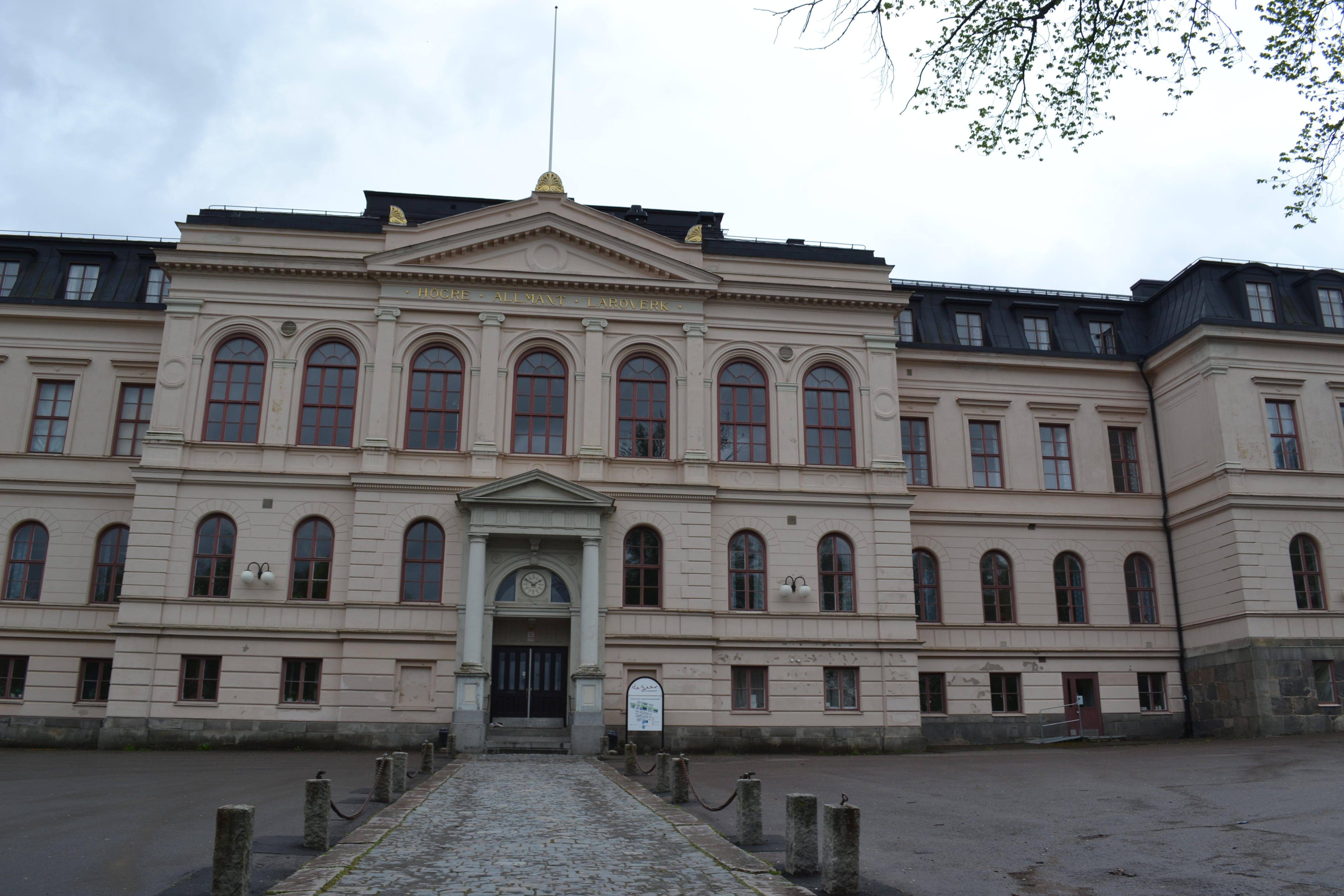 Gamla De Geerskolan in Norrköping